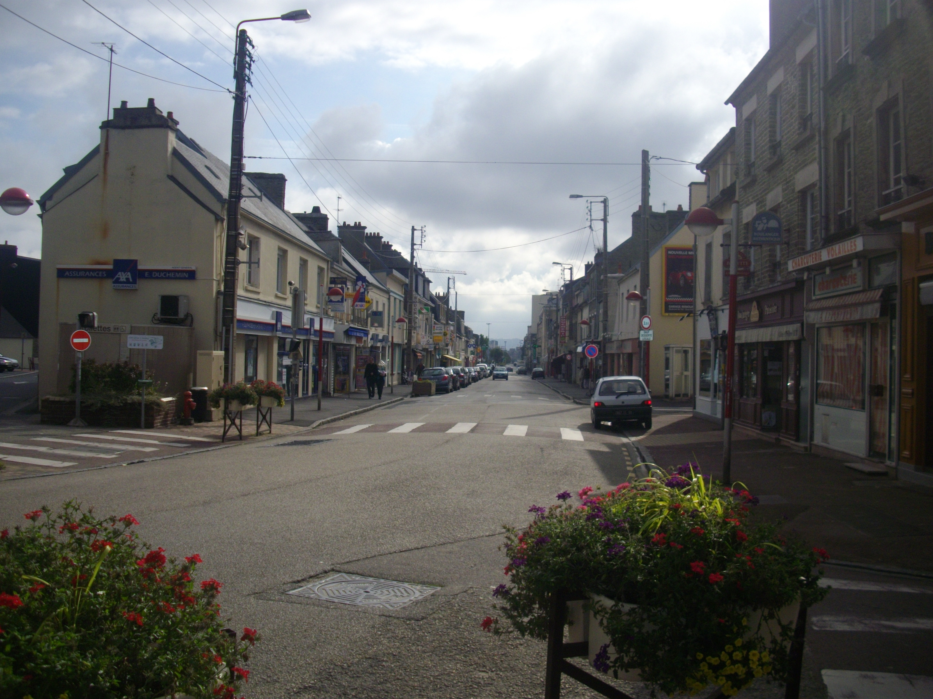 Rue Gambetta, à Equeurdreville. Un axe marchand majeur dans la ville, appelée "Rue principale" avec la Rue de la Paix, dans sa prolongation.